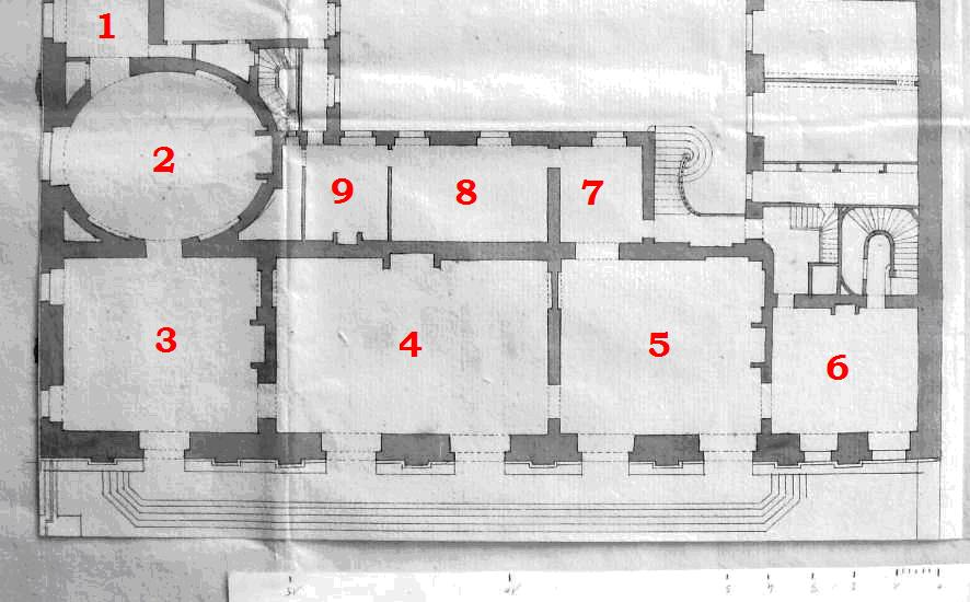 Plan de l'appartement des marronniers, vers 1703.